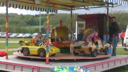 Enfants